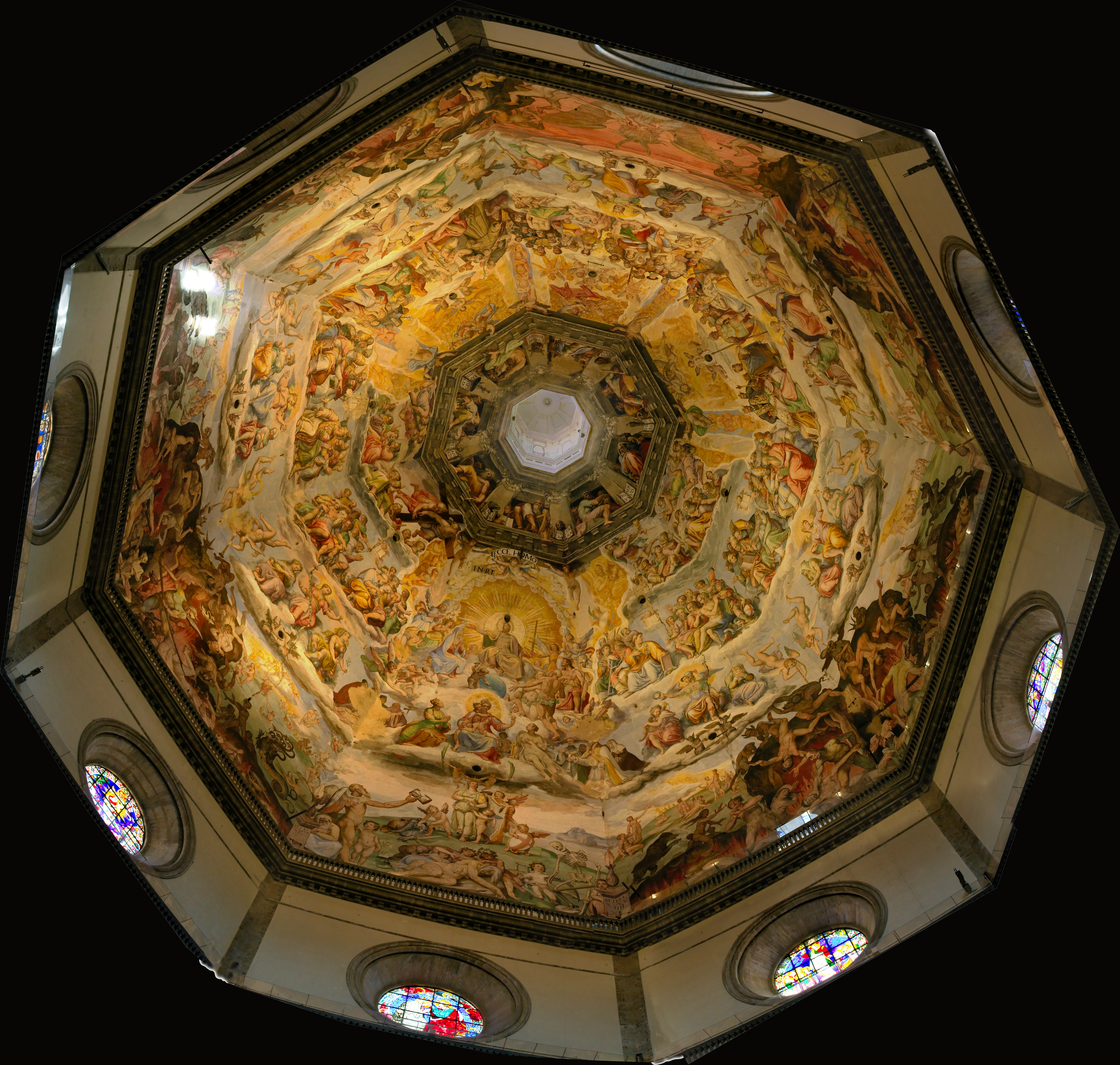 cupola Santa Maria del Fiore Florence